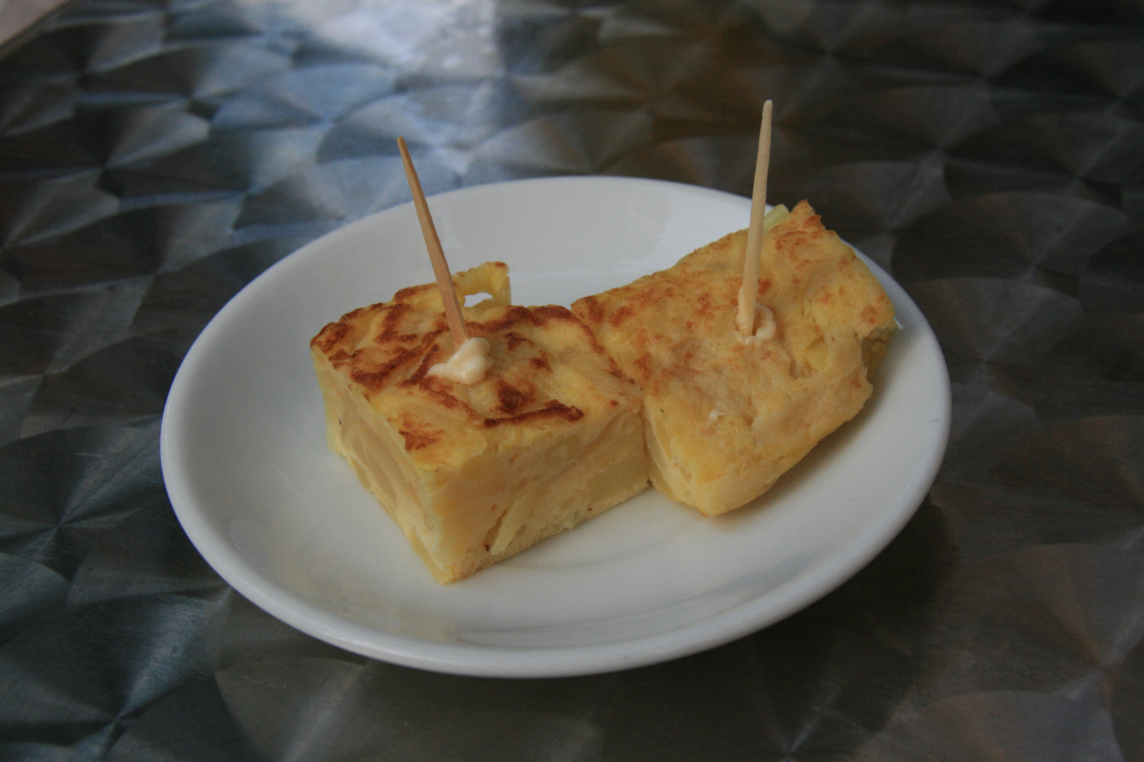 Pinchos de tortilla española, los palillos tienen mahonesa